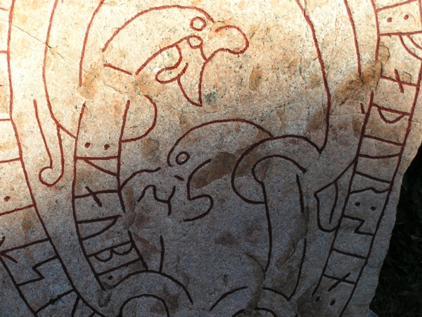 Sö325 Härads kyrka